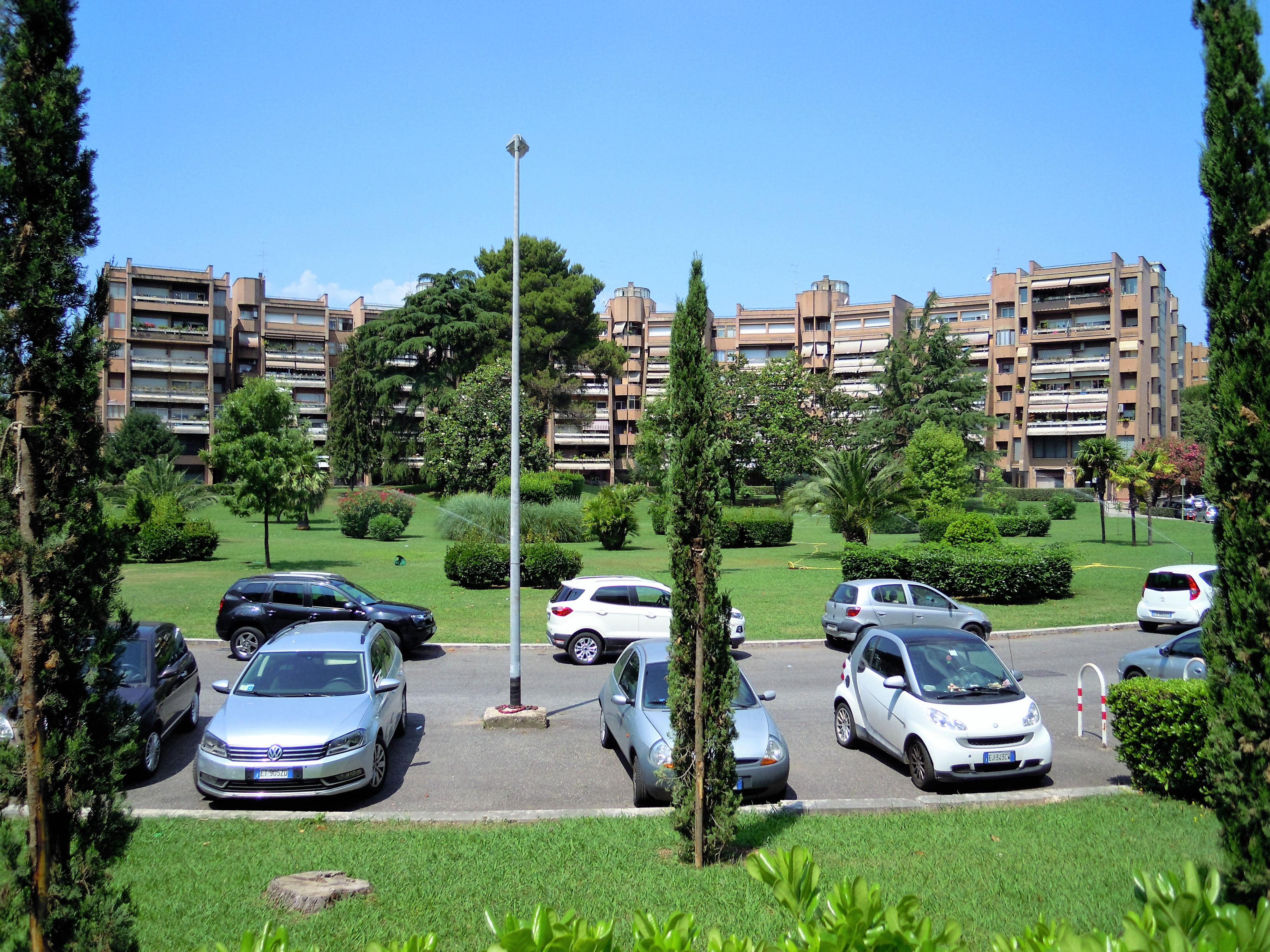 Roma, quartiere Giuliano-Dalmata: giardino di piazza Bernardo Zamagna